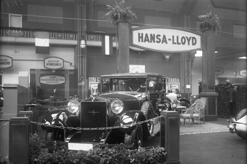 Die Eröffnung der Internationalen Automobilausstellung in den Ausstellungshallen am Kaiserdamm in Berlin! Blick auf den Hansa-Lloyd- Stand in der alten Autohalle.